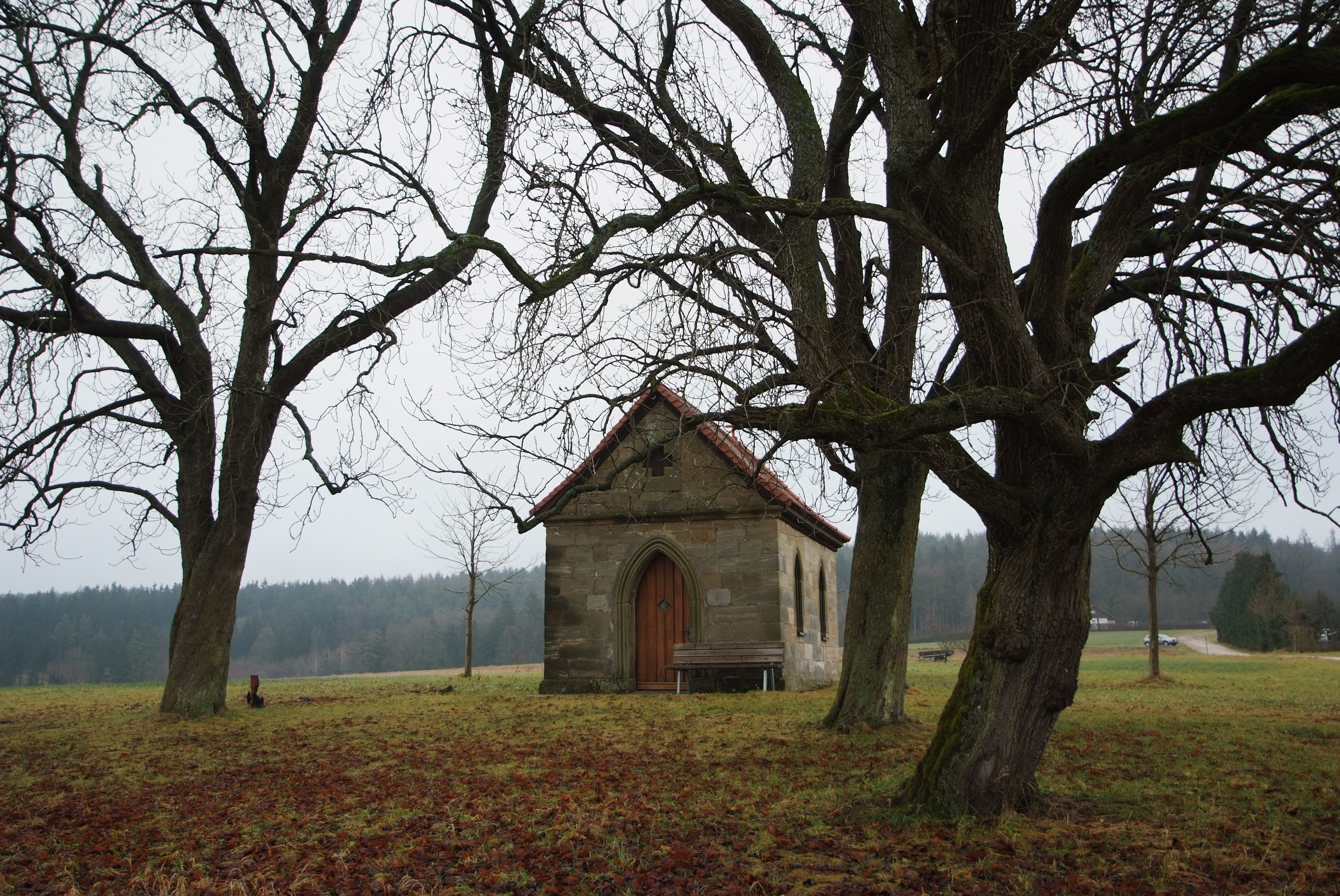 Donatuskapelle, AschachThis is a photograph of an architectural monument.